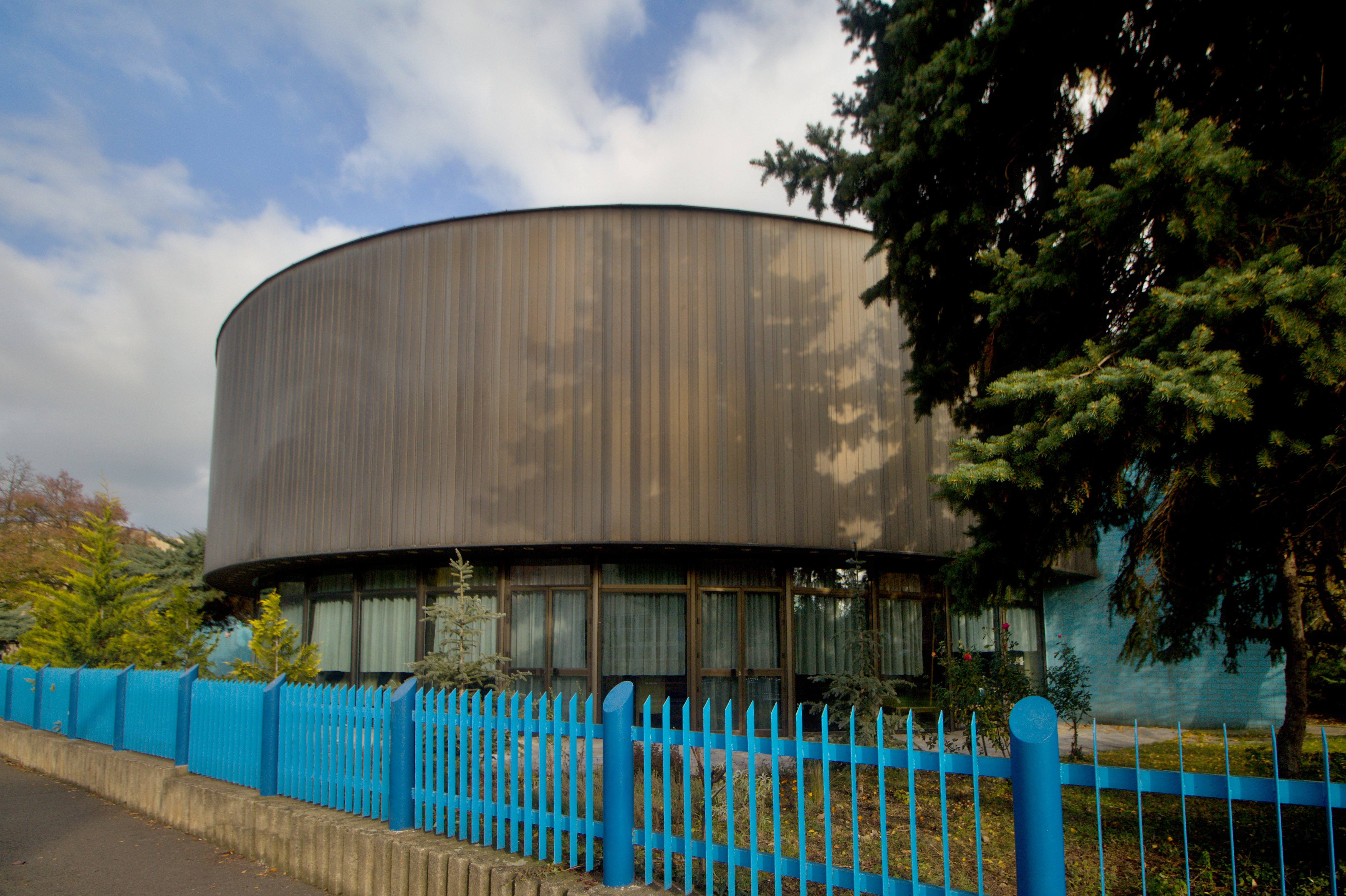 Praha 6-Bubeneč, pravoslavný chrám sv. Ludmily